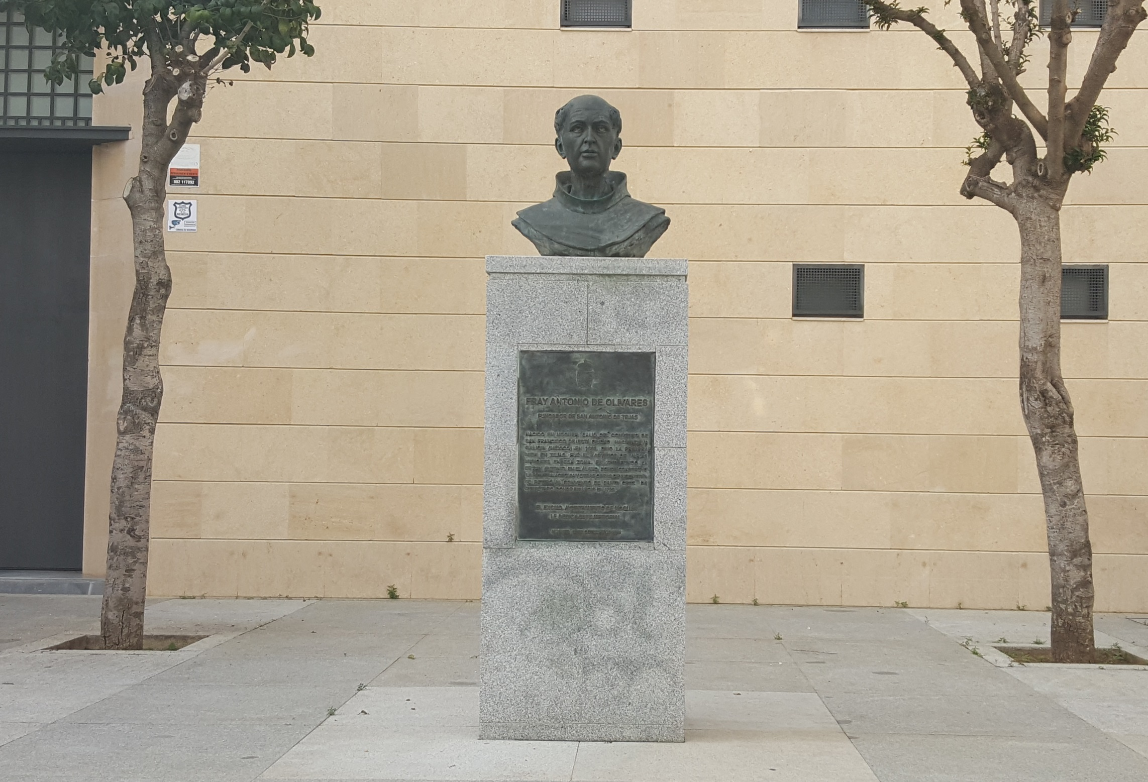 Monumento de Fray Antonio de Olivares en Plaza de San Francisco de Moguer (España)